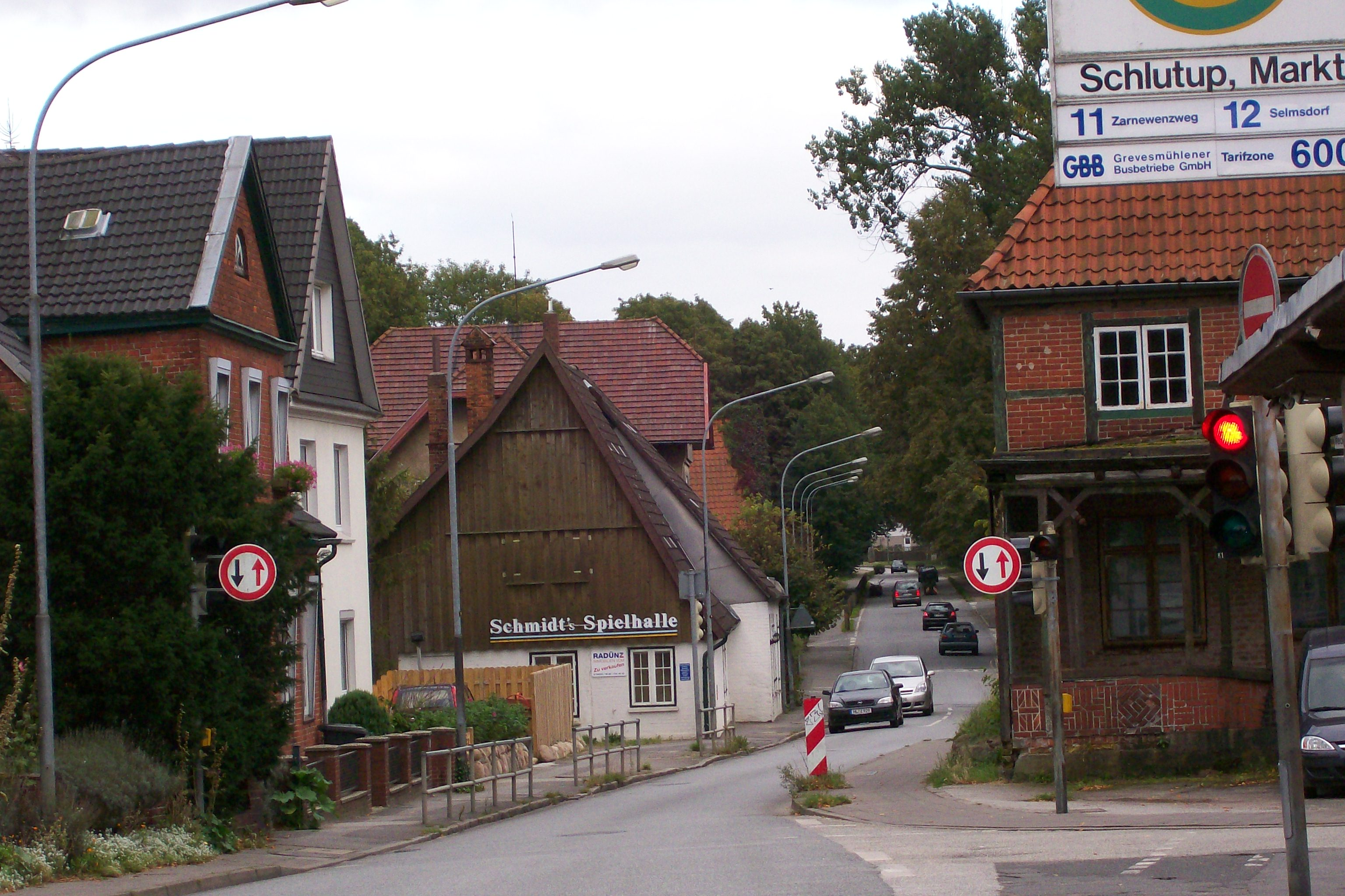 Mecklenburger Straße in Lübeck-Schlutup östlich des Schlutuper Markts. Die Straße führte bis 1989 zum Grenzübergang zur DDR. Nach Grenzöffnung 1989 quälte sich der gesamte Straßenverkehr bei Lübeck bis zum Bau einer Umgehungsstraße auf dem ehemaligen Grenzstreifen durch diesen Engpass zwischen Schleswig-Holstein und Mecklenburg-Vorpommern.